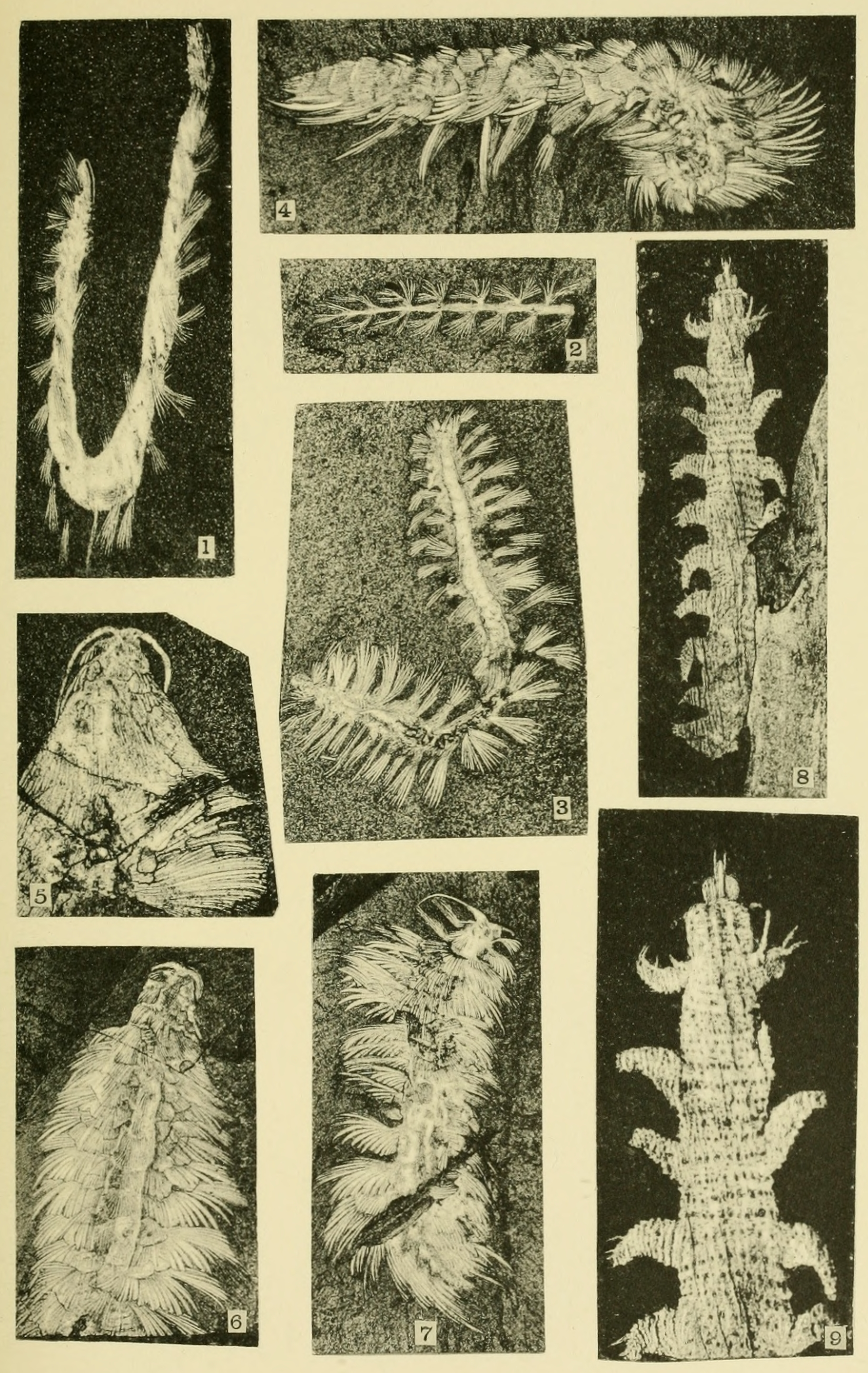 Plate 23: Middle Cambrian Annulata (Canadia and Aysheaia) 1. Canadia setigera Walcott = 2. Canadia setigera Walcott = 3. Canadia setigera Walcott = 4. Canadia spinosa Walcott = 5. Canadia spinosa Walcott = 6. Canadia spinosa Walcott = 7. Canadia spinosa Walcott = 8. Aysheaia pedunculata Walcott = 9. Aysheaia pedunculata Walcott =